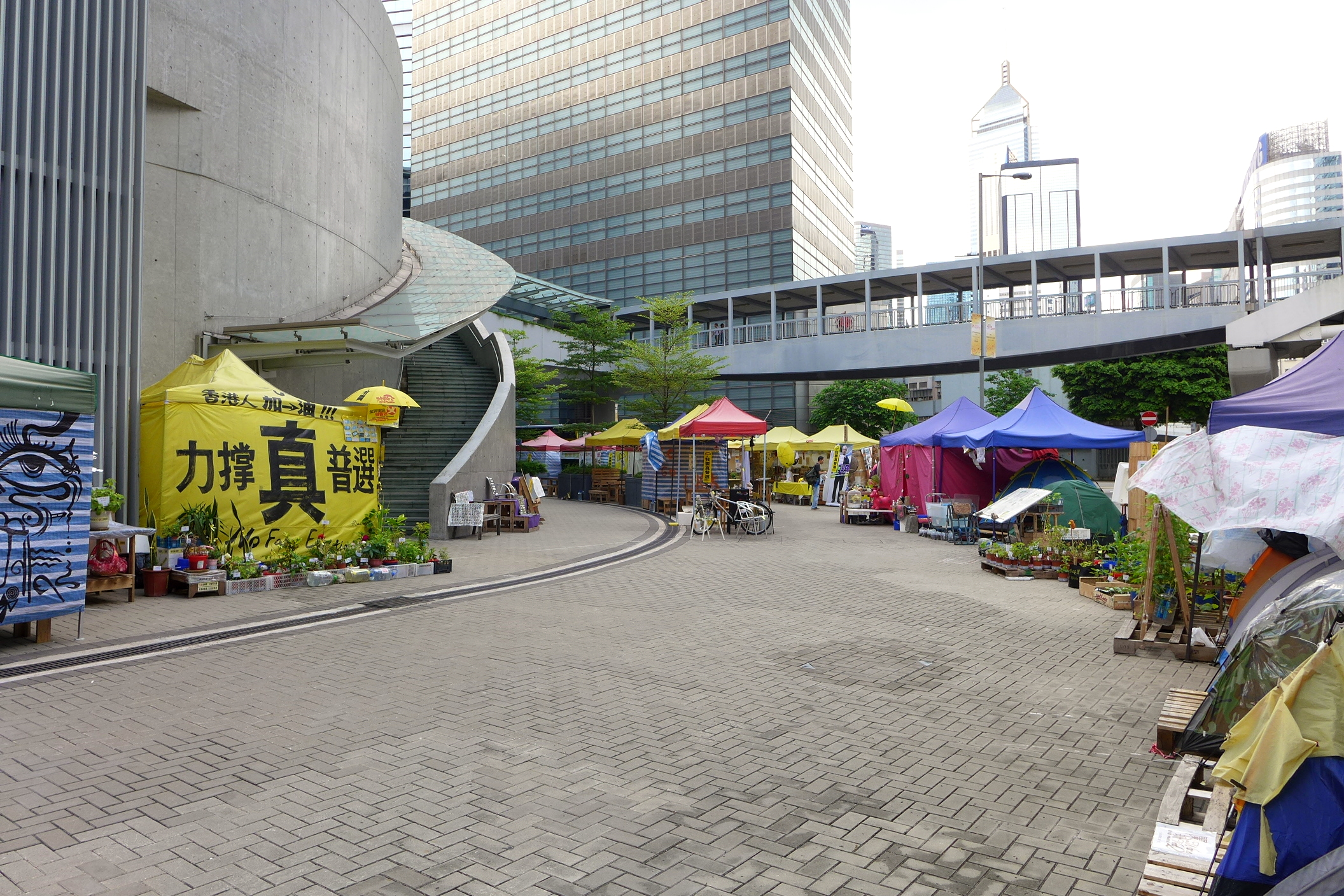 Tim Mei New Villege 添美新村